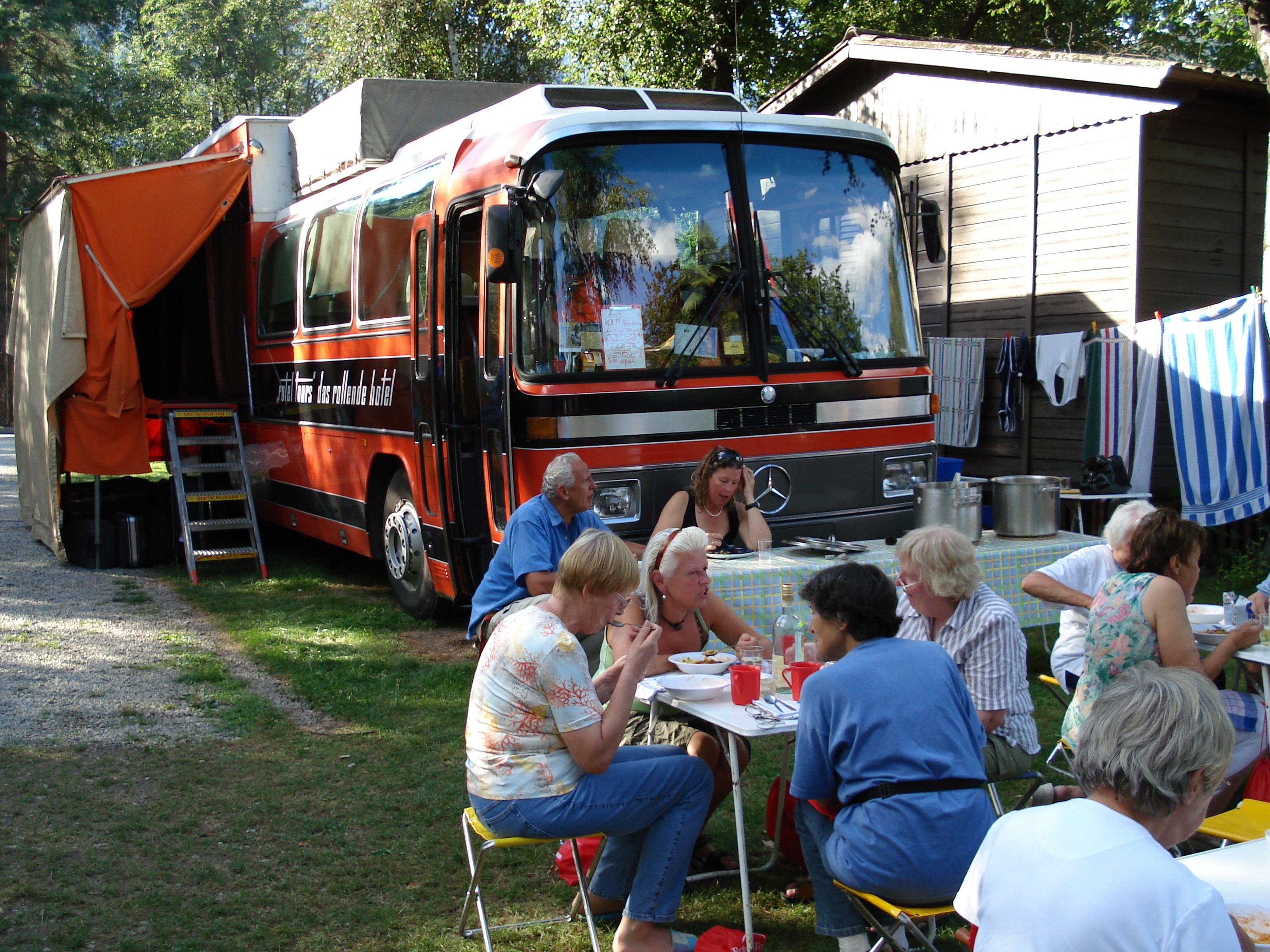 Rotel Reise in der Schweiz 2007